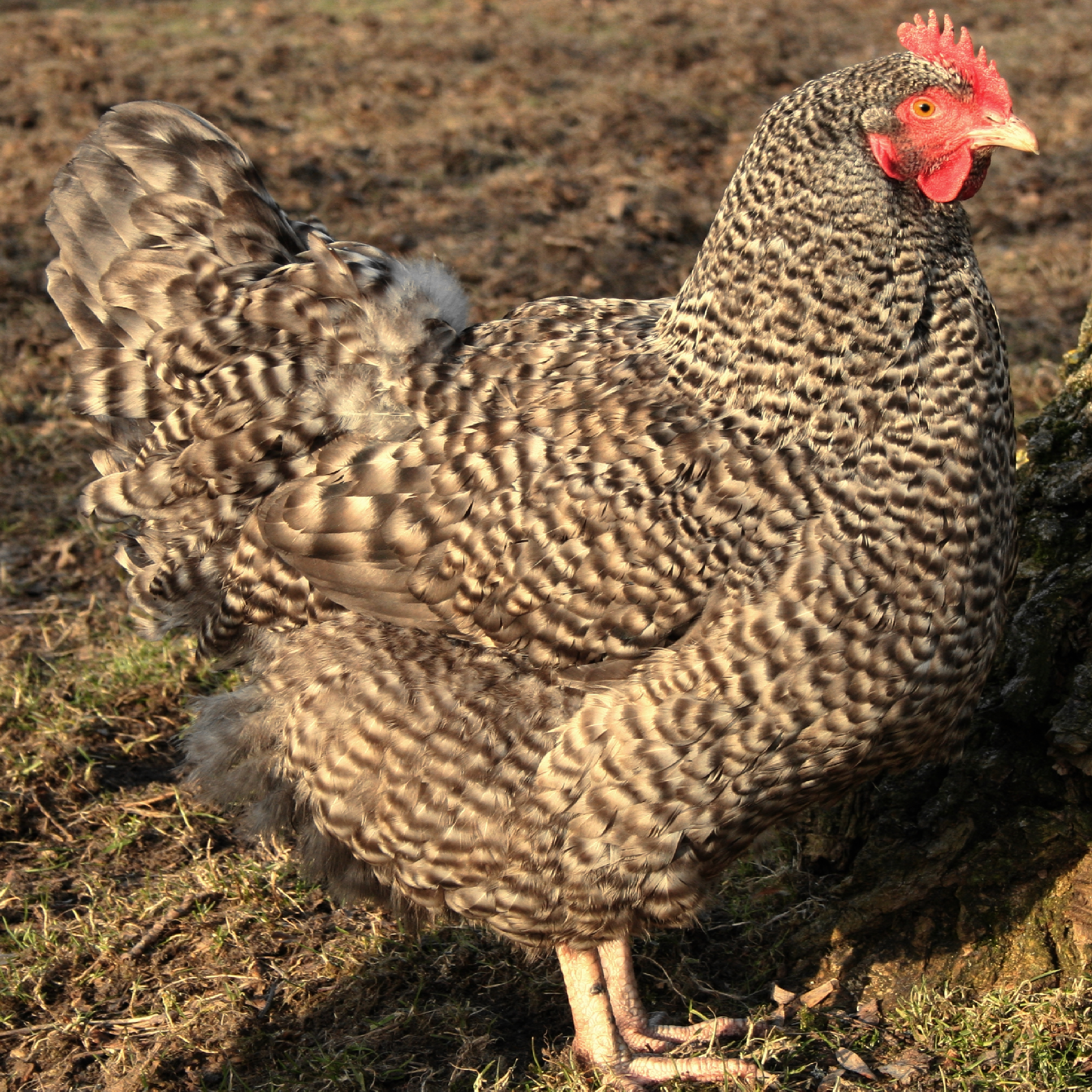 Noord Hollands Blauw, volwassen han